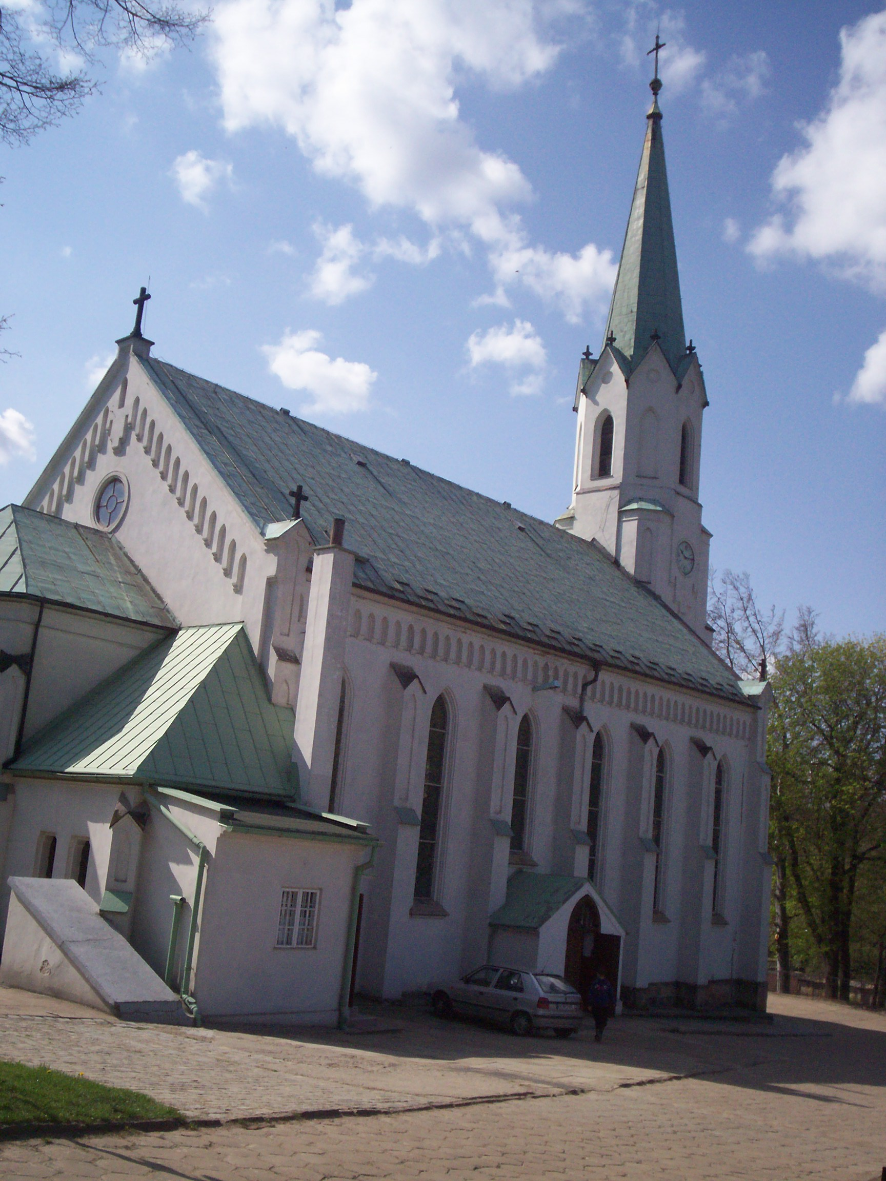 Kościół pw. “Świętej Barbary” w Wałbrzychu.